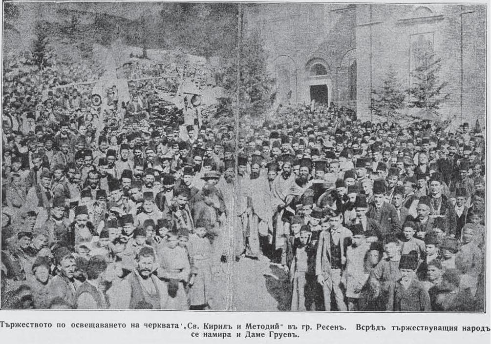 Тържествата при освещаването на църквата "Св. св. Кирил и Методий" в Ресен на 27 август 1894 година.